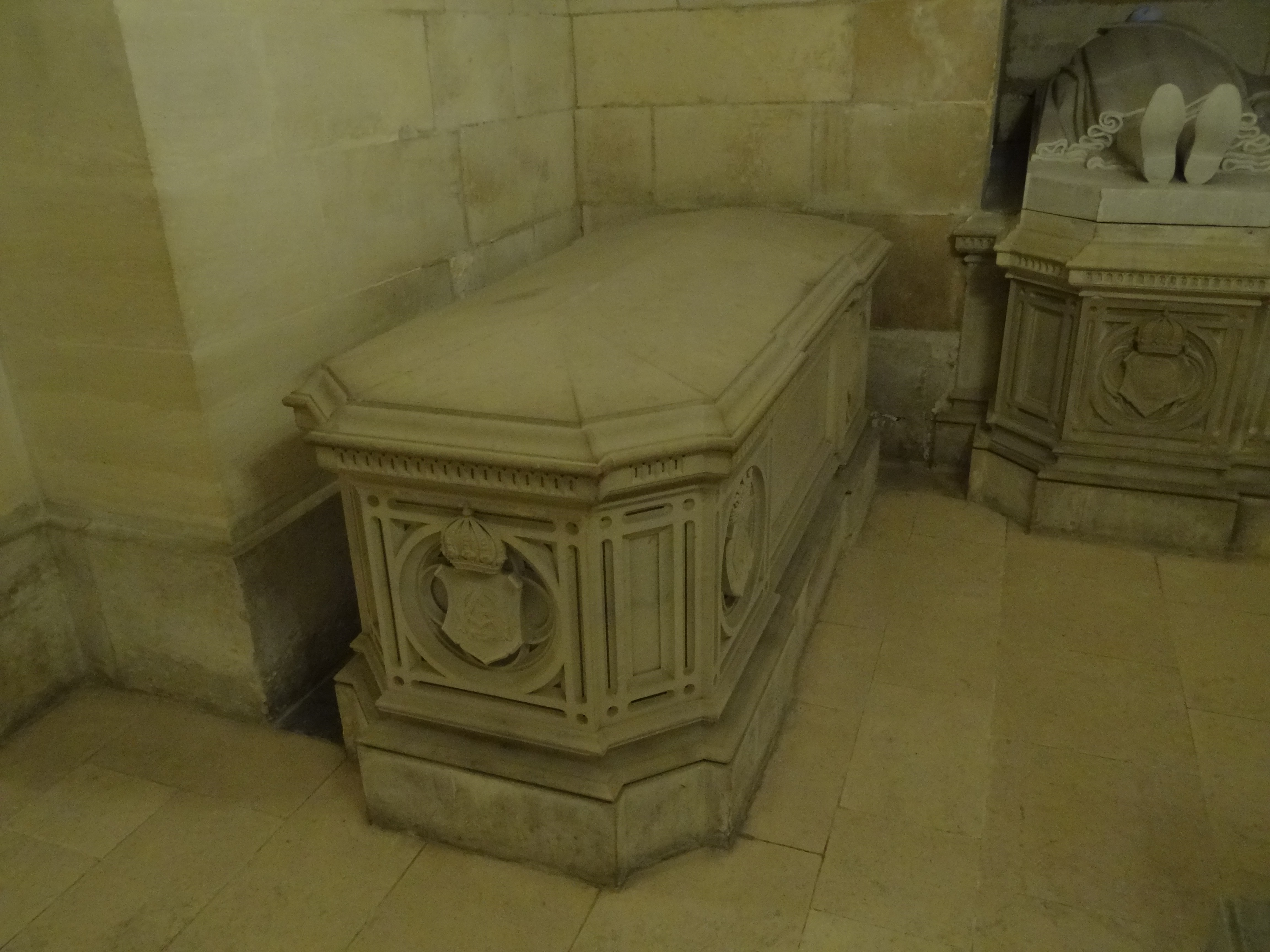 Le tombeau du prince Antoine d'Orléans-Bragance, prince du Brésil, dans la galerie occidentale de la crypte de la chapelle royale Saint-Louis à Dreux.